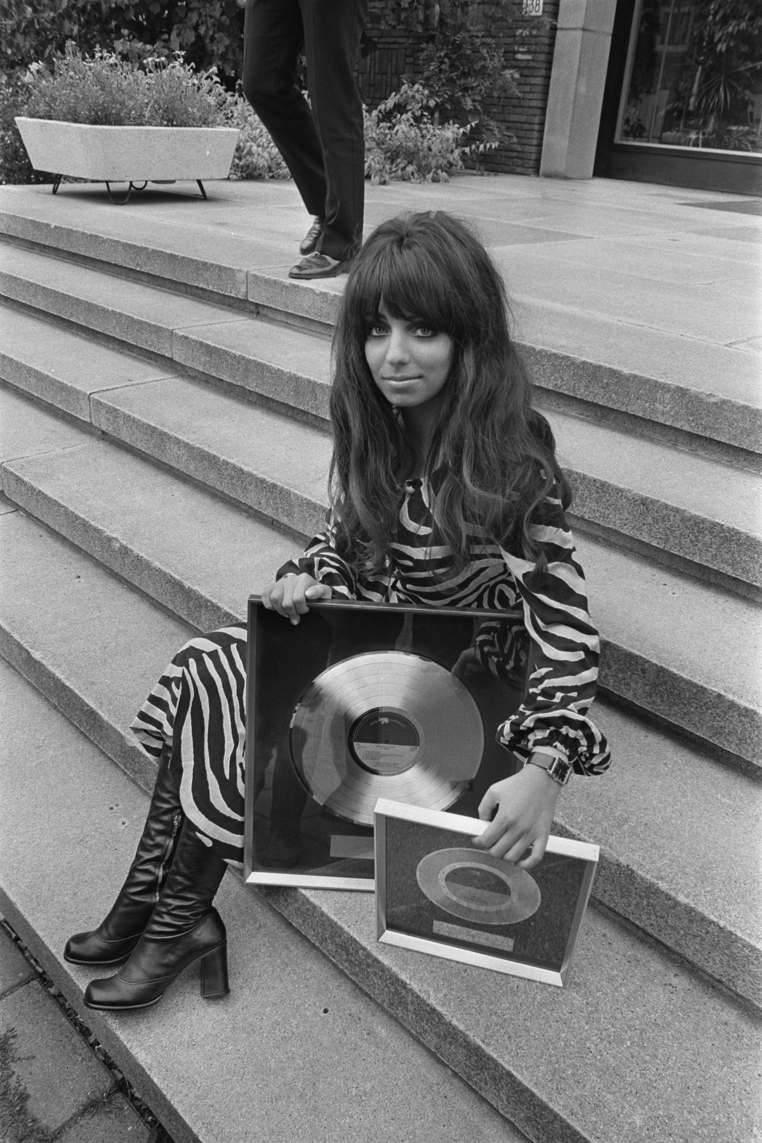 Collectie / Archief : Fotocollectie Anefo Reportage / Serie : [ onbekend ] Beschrijving : Shocking Blue krijgt gouden en platina platen in Hilton Hotel, Amsterdam; Mariska Veres met platen Datum : 2 september 1970 Locatie : Amsterdam, Noord-Holland Persoonsnaam : Veres, Mariska Instellingsnaam : Hilton Hotel, Shocking Blue Fotograaf : Evers, Joost / Anefo Auteursrechthebbende : Nationaal Archief Materiaalsoort : Negatief (zwart/wit) Nummer archiefinventaris : bekijk toegang 2.24.01.05 Bestanddeelnummer : 923-8078